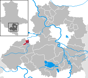 Schraplau in Saxony-Anhalt - Saalekreis